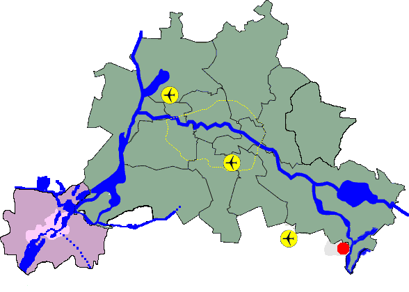 GNU-FDL